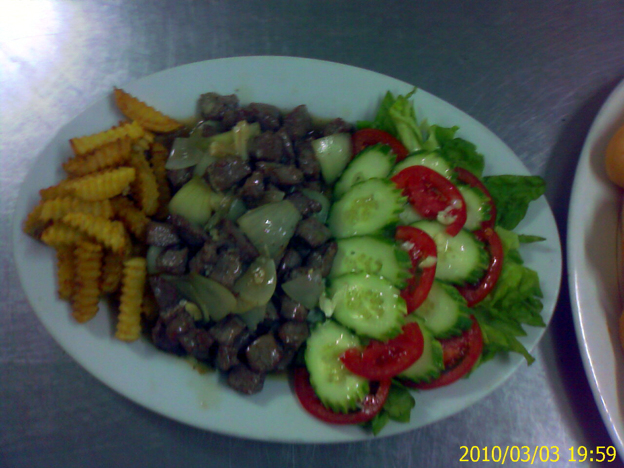 Bo luc lac